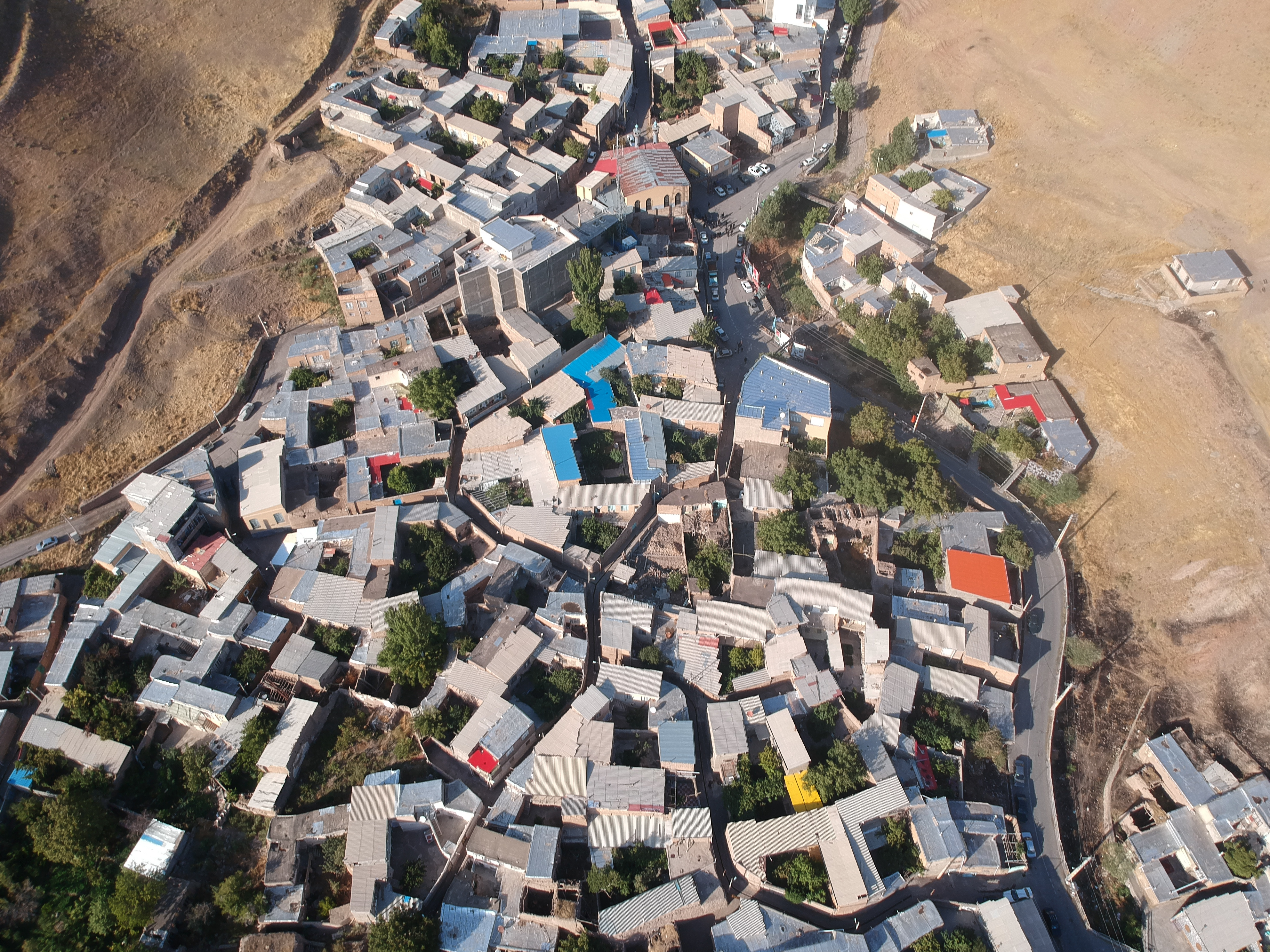 تصویر هوایی و زیبا از دهکده توریستی اندبیل